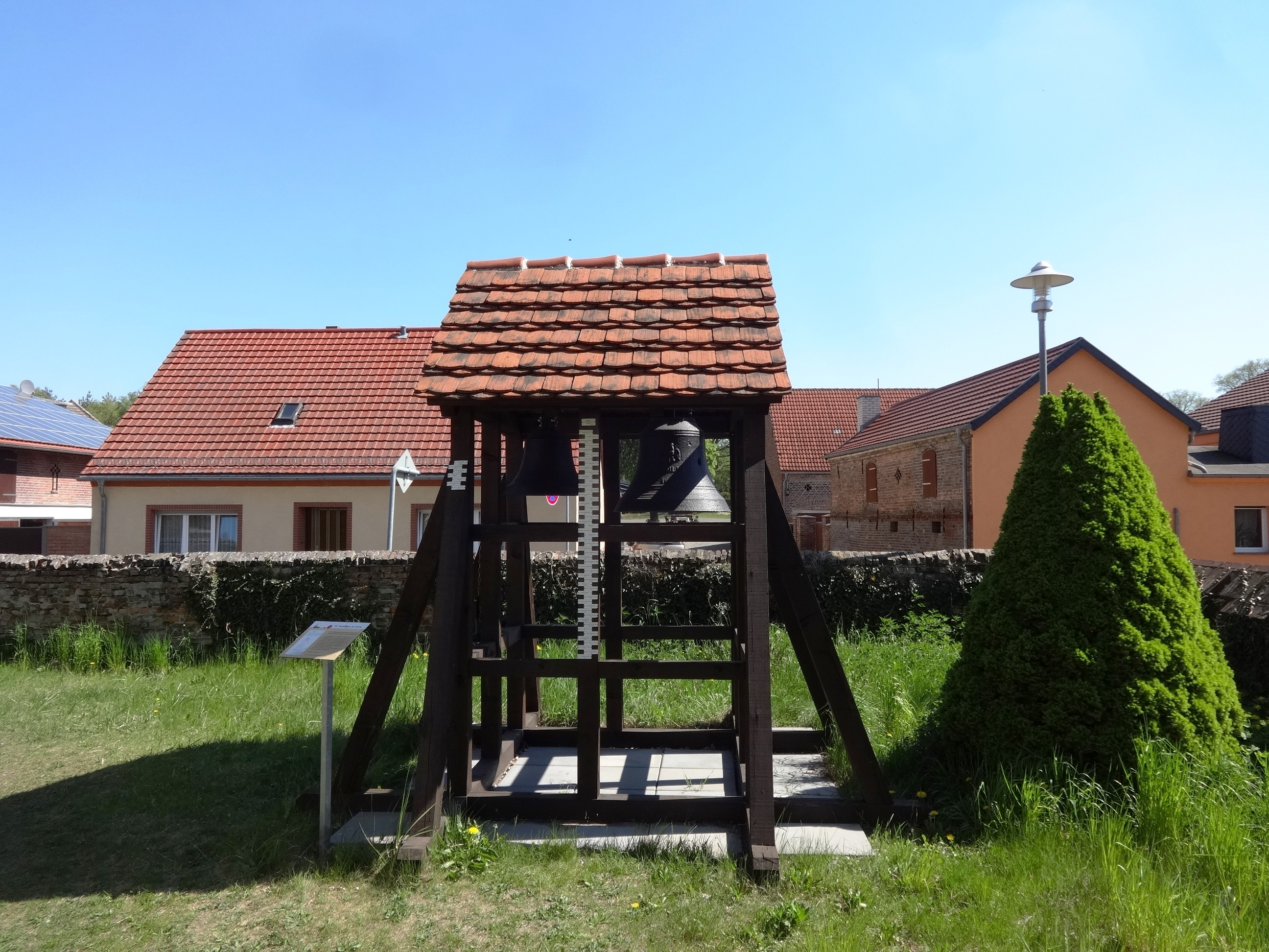 Die Dorfkirche Schäpe ist eine Saalkirche mit Apsis, die im Jahr 1755 errichtet wurde. Im Innern befinden sich eine polygonale Kanzel sowie eine Hufeisenempore aus der Bauzeit der Kirche. Die Orgel stammt aus der Mitte des 19. Jahrhunderts.